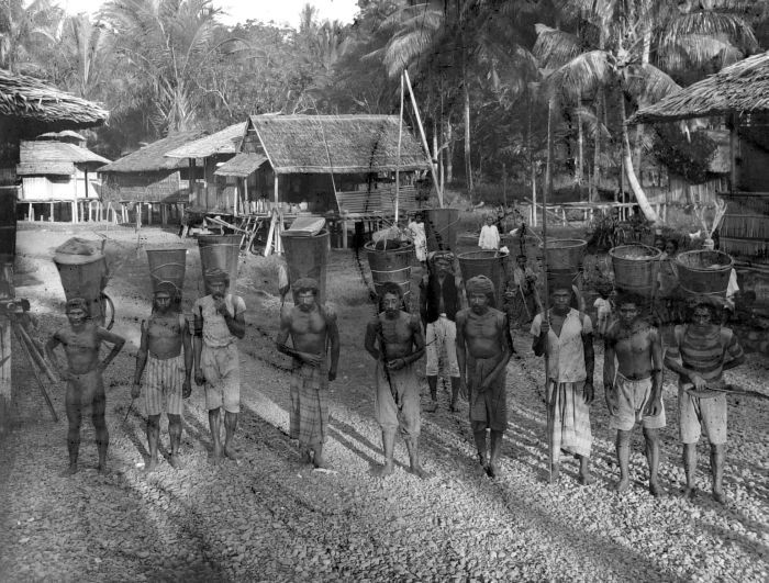 Negatief. Alfoerse damar halers van Halmahera in kampong Palamea , Batjan